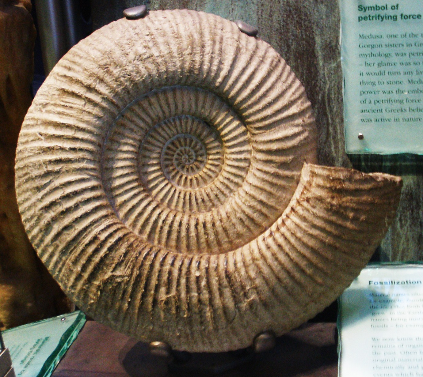 Fossil of Titanites, an extinct mollusc-- Took the photo at Natural History Museum, London